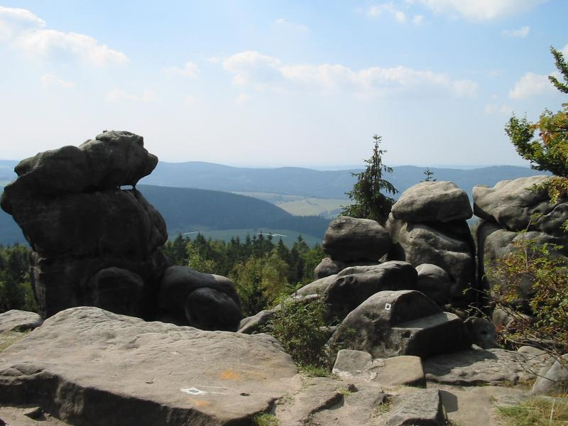 Vrchol Čáp